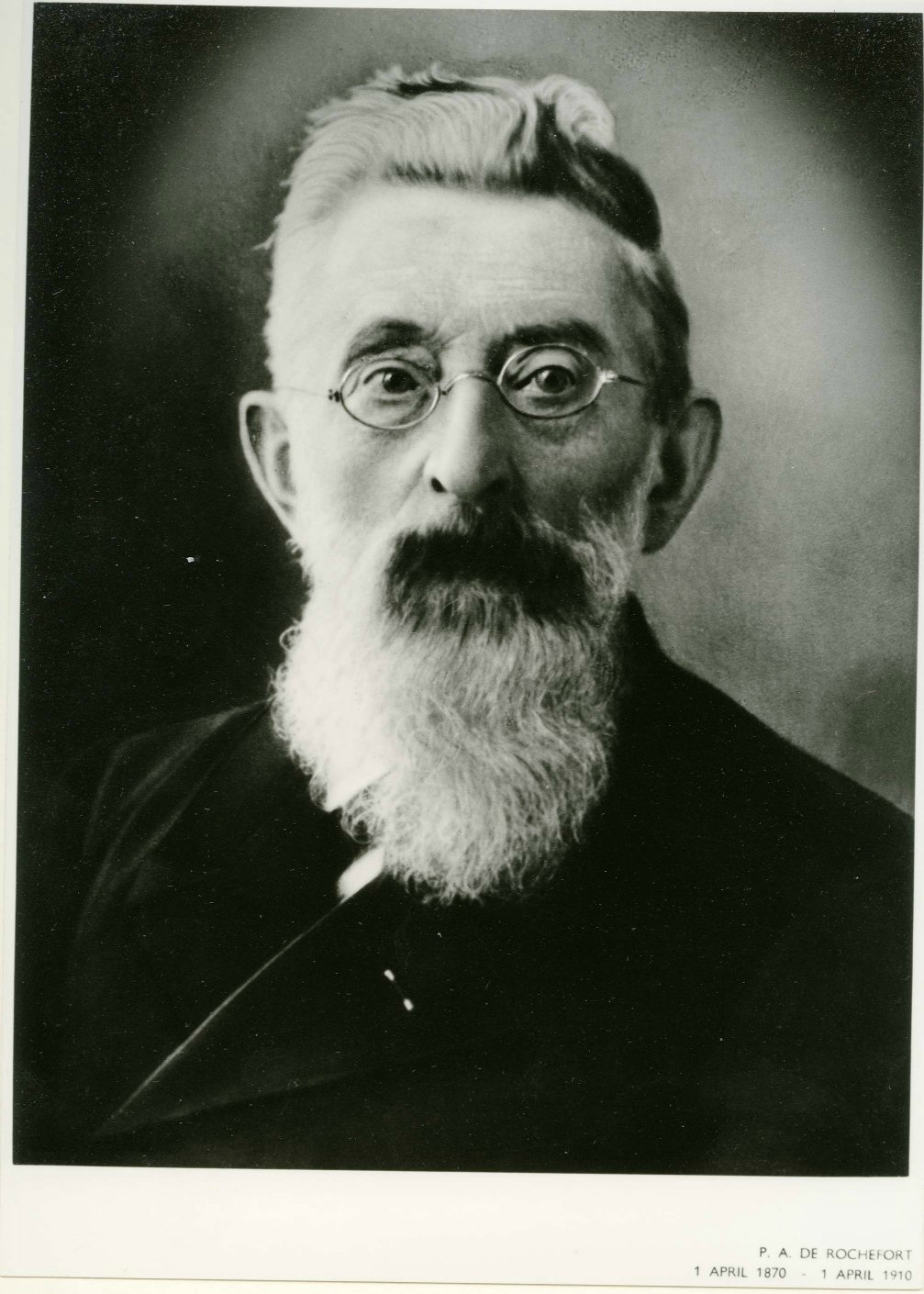 Portret van Pieter Abraham de Rochefort, burgemeester van Ezinge en Leens